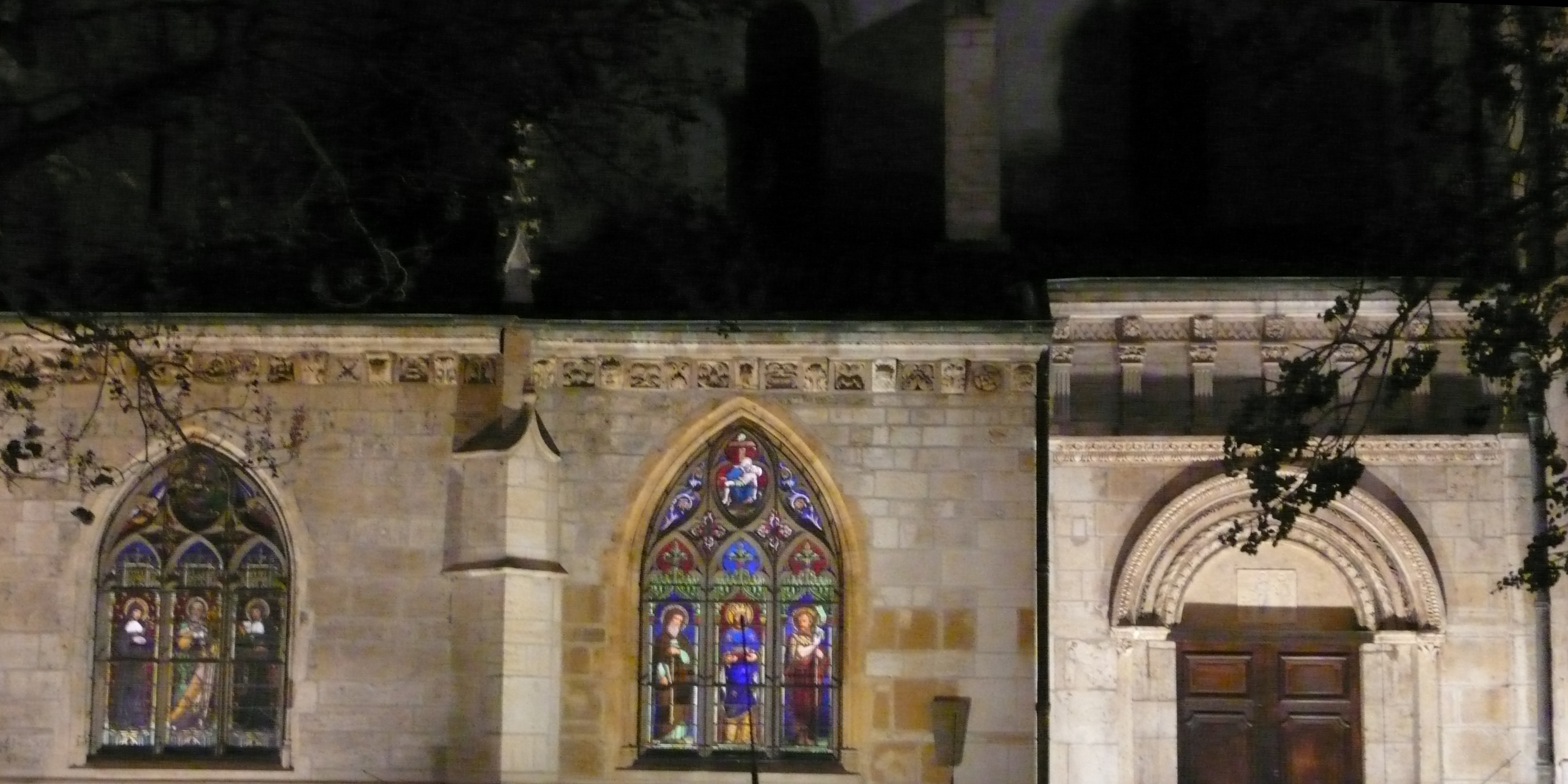 Extérieur de l'église Saint-Paul de Lyon (F-69005) de nuit.